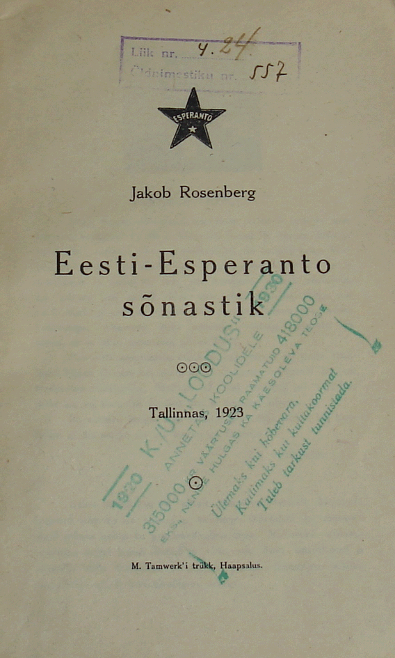 librokovrilo de "Eesti-Esperanto sonastik", 1923